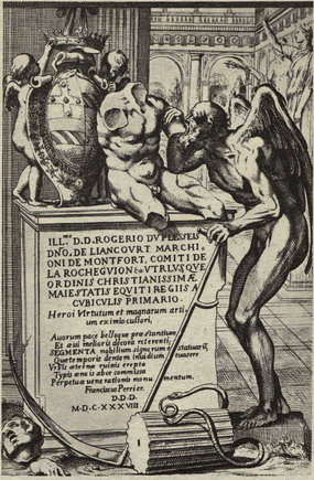 Франсуа Перьє.Хронос-руйнівник фронтиспіс1638 р.jpg